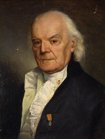 Ritratto di Giocondo Albertolli, olio su tela, 50,3 x 64,8 cm, Pinacoteca di Brera, Milano